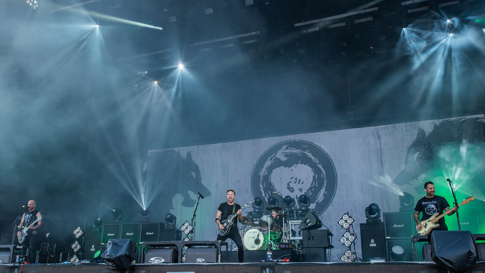 ARGO-Konzerte,Brandon Barnes,Festival,Joe Principe,Konzert,Livekonzert,Livemusik,Musik,RiP,Rise Against,Rock im Park 2018,Tim McIlrath,Zach Blair,Zeppelin Stage